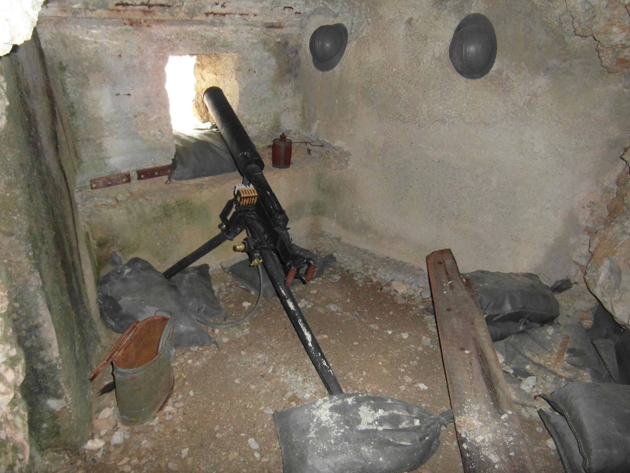 Gallerie del Lagazuoi